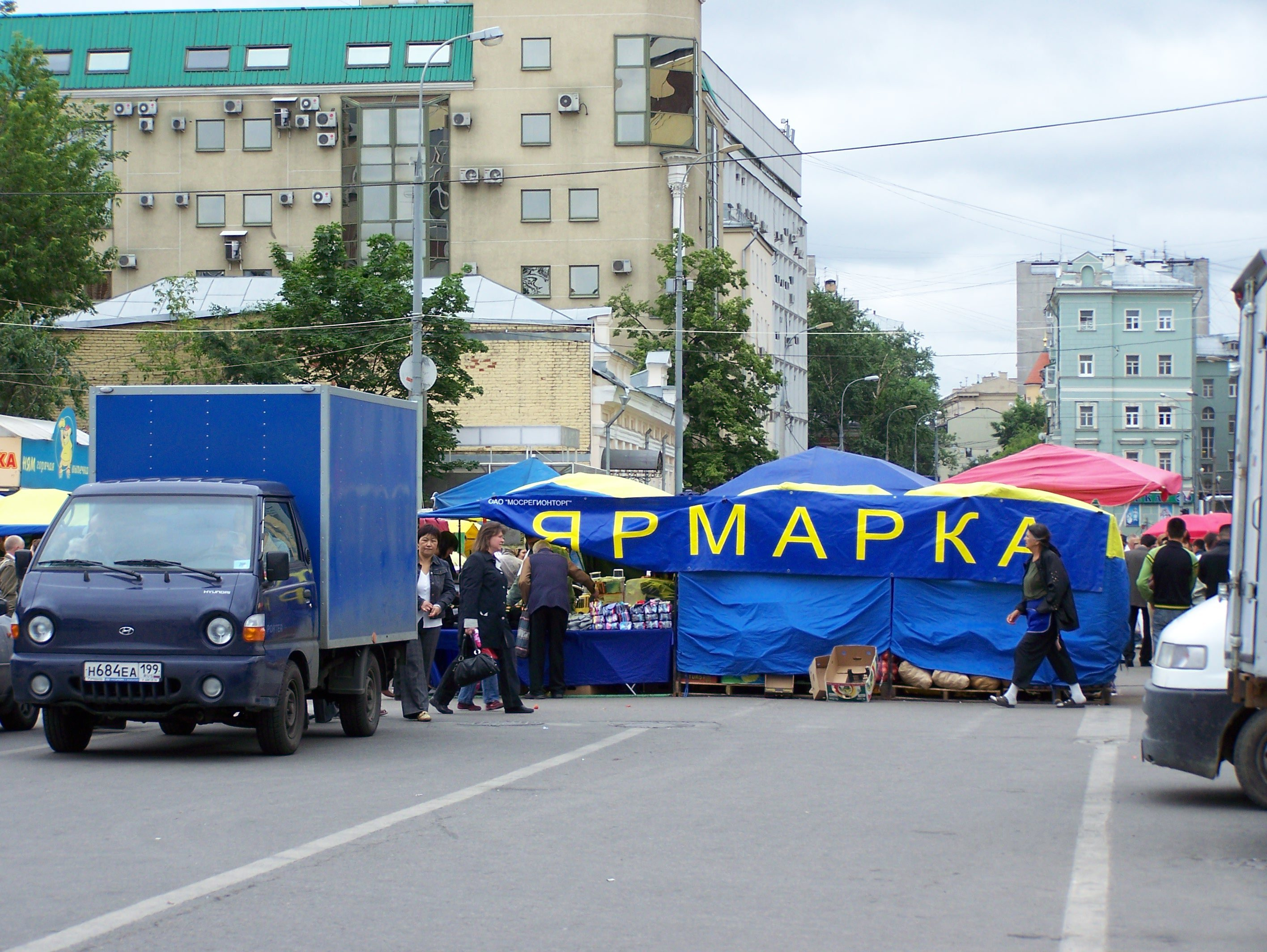 Weekend market on Schepkina Street, Moscow (Meshchansky District)